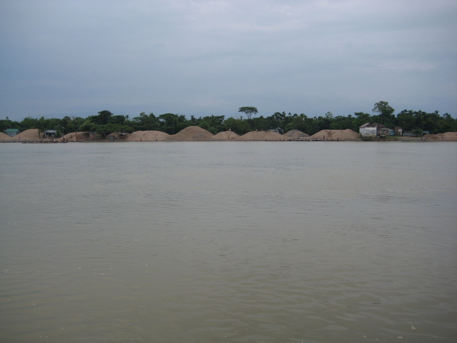 Surma River, Sunamganj, Sylhet, Bangladesh